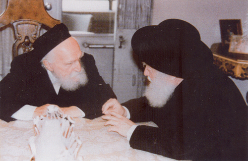 הרב פינשטין יחד עם הרב שפירא